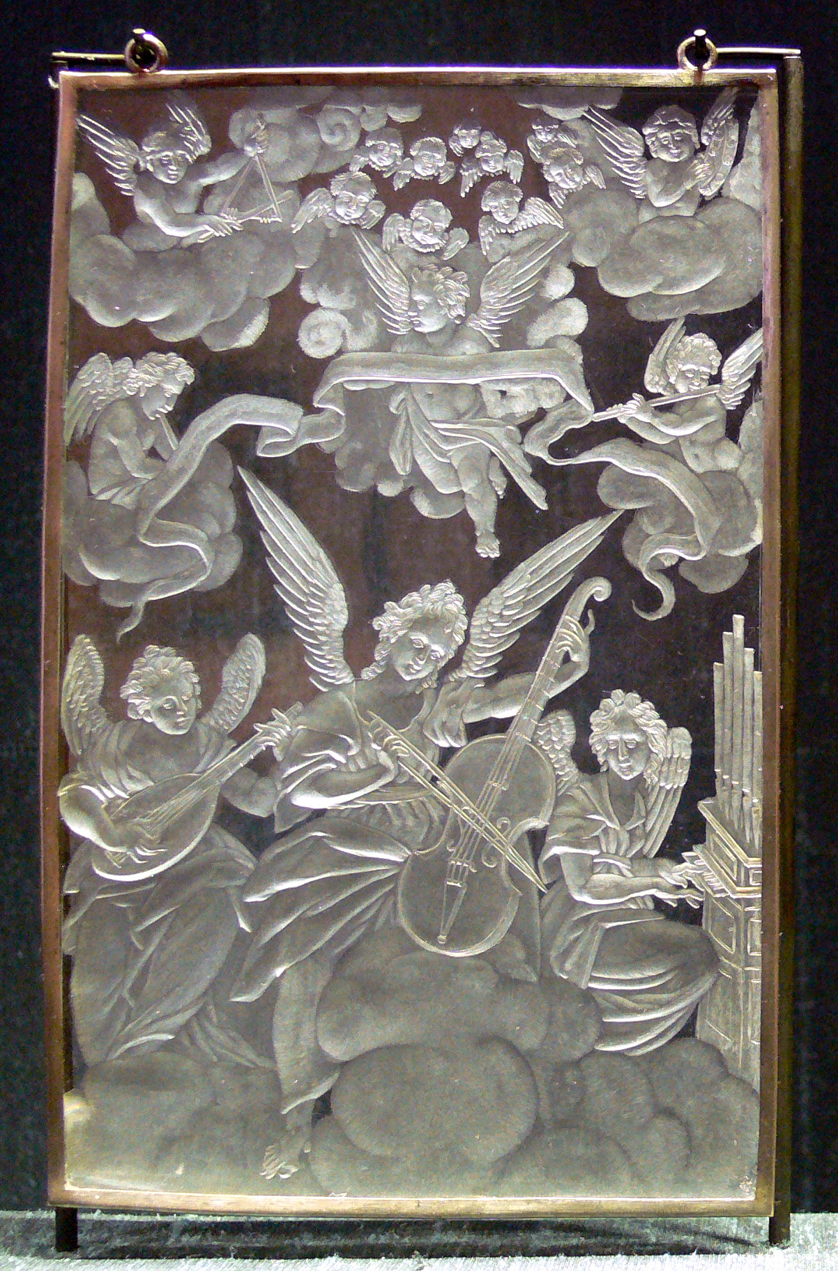 Tafel mit musizierenden Engeln; Caspar Lehmann zugeschrieben; München um 1586–1588 Bergkristall mit Silberfassung; aus der Silberkammer der Münchner Residenz Bayerisches Nationalmuseum, München, Inv. Nr. R 2163